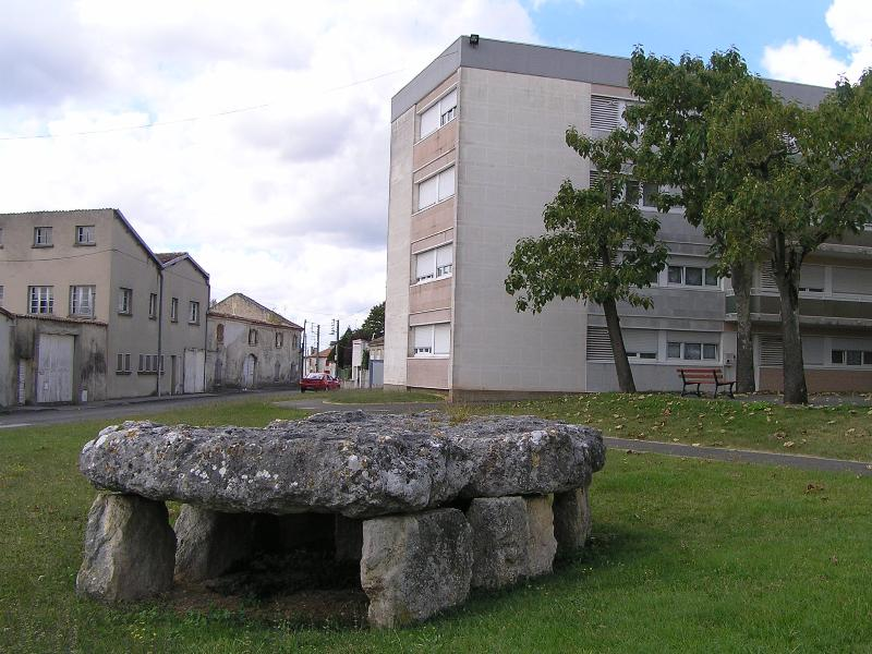 Dolmen de la cité du dolmen à Cognac, Charente, France